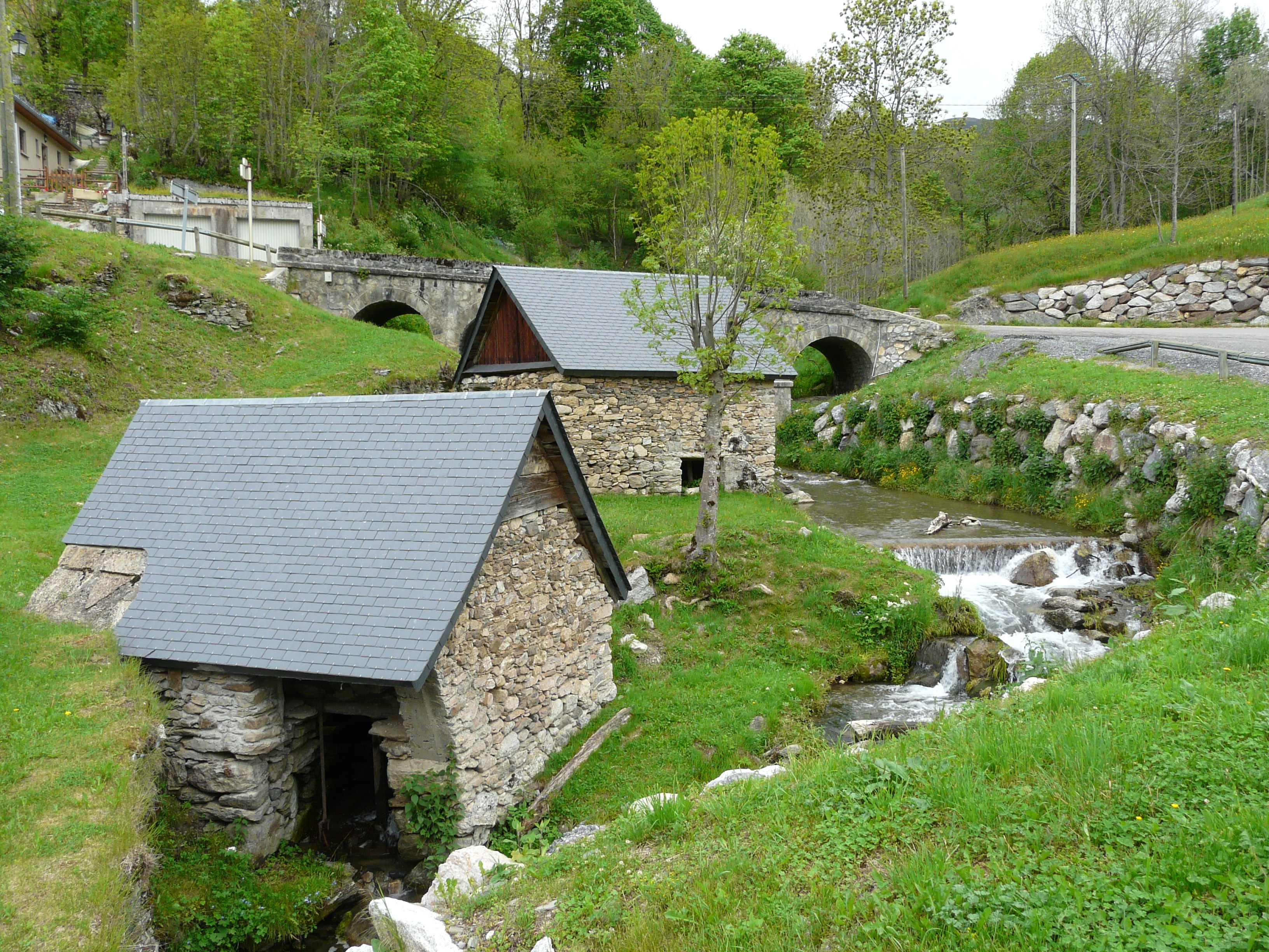 Deux petits moulins à eau alimentés par le ruisseau de Labach à l'entrée du village de Portet-de-Luchon, Haute-Garonne, France. Le ruisseau sert de limite entre Portet-de-Luchon (à gauche) et Jurvielle (à droite).